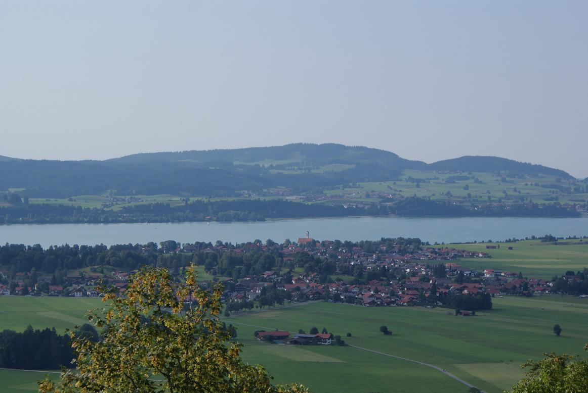 Vista de Schwangau desde el Castillo de Neuschwanstein